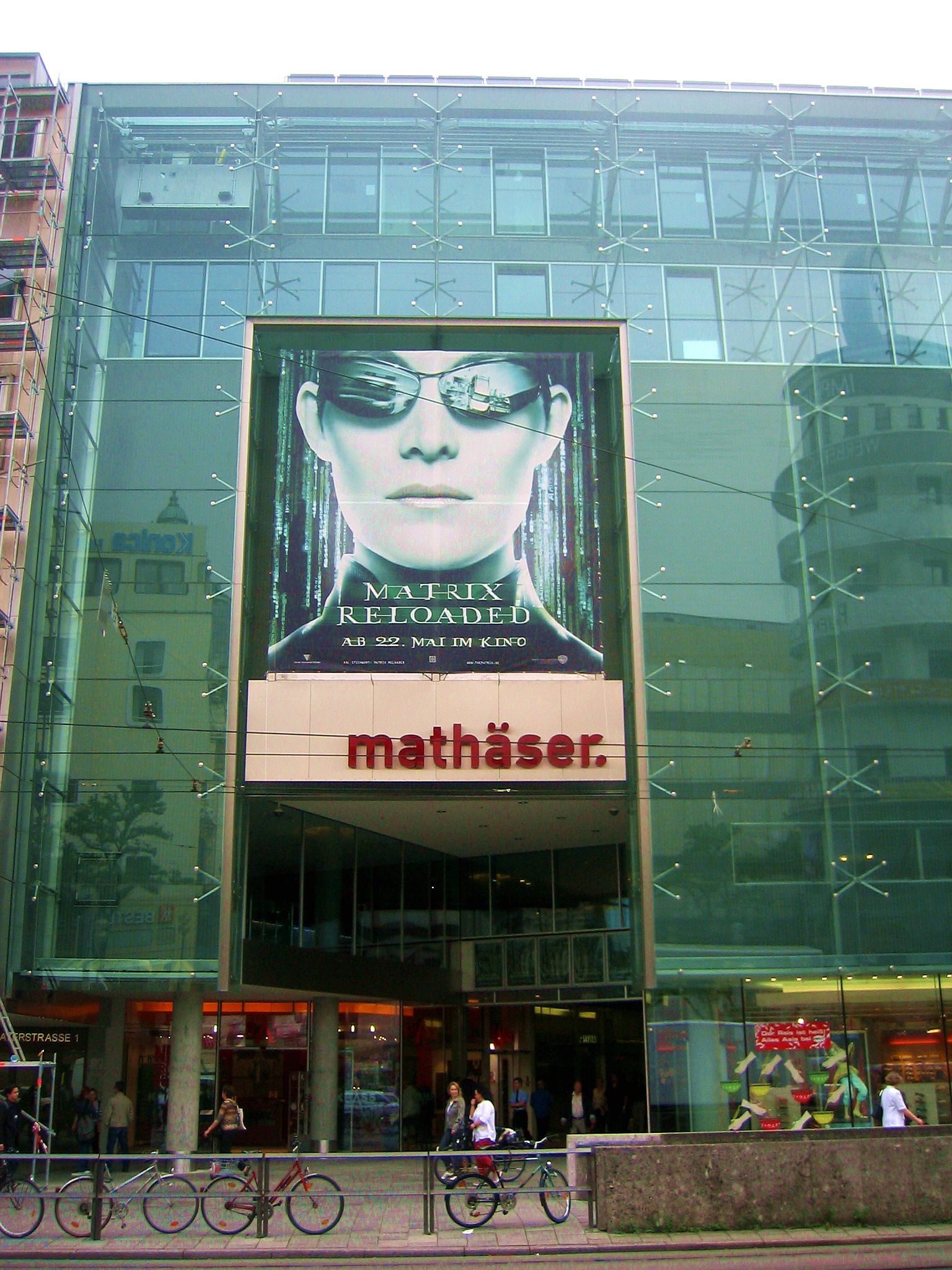 München, Germany: Mathäser Filmpalast